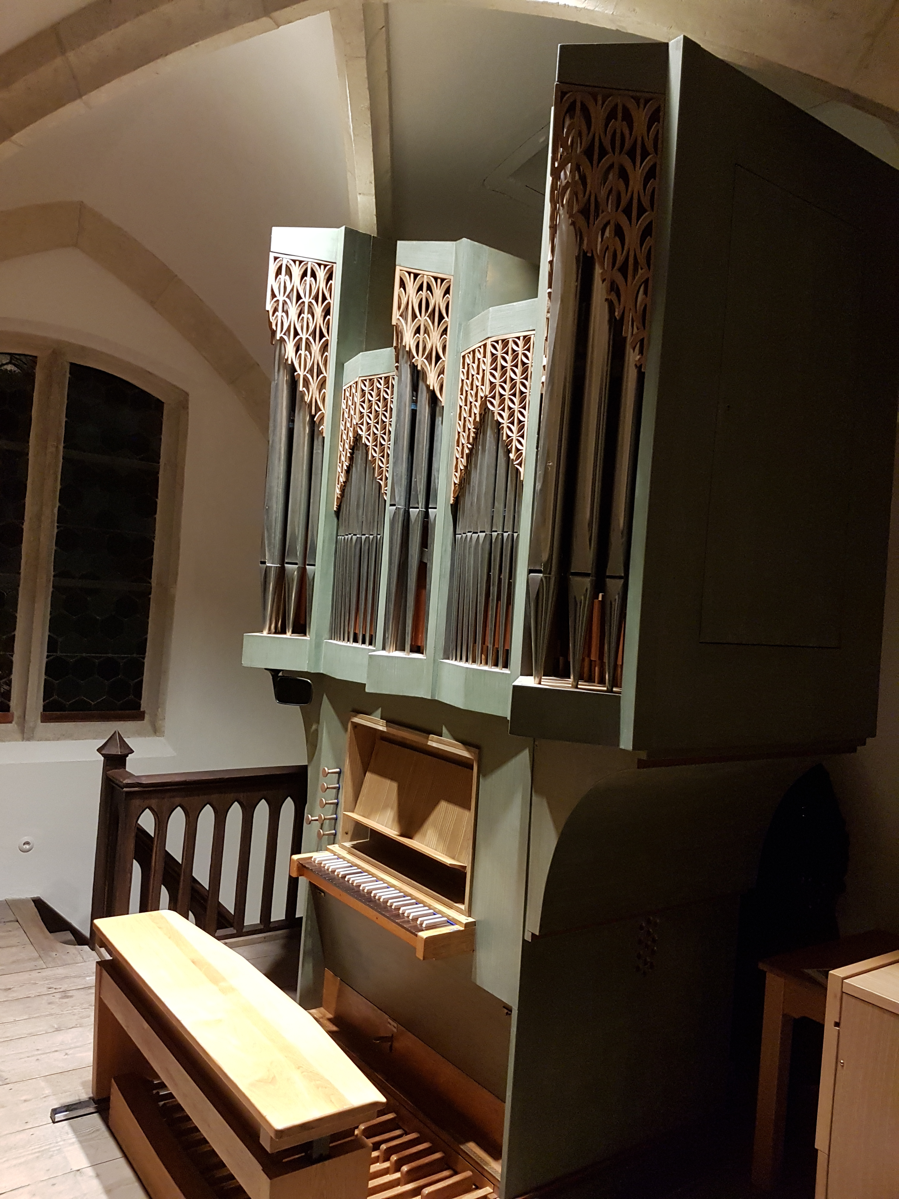 Orgel der Katharinenspitalkirche Regensburg, erbaut von Heribert Heick